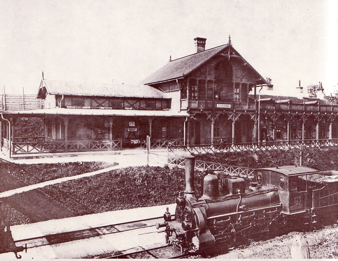 Der alte Bahnhof Tschirm (ung. Csorba, slow. Štrba) wurde nach dem Bau der Kaschau-Oderberger Bahn zu einem der Ausgangspunkte in die Hohe Tatra